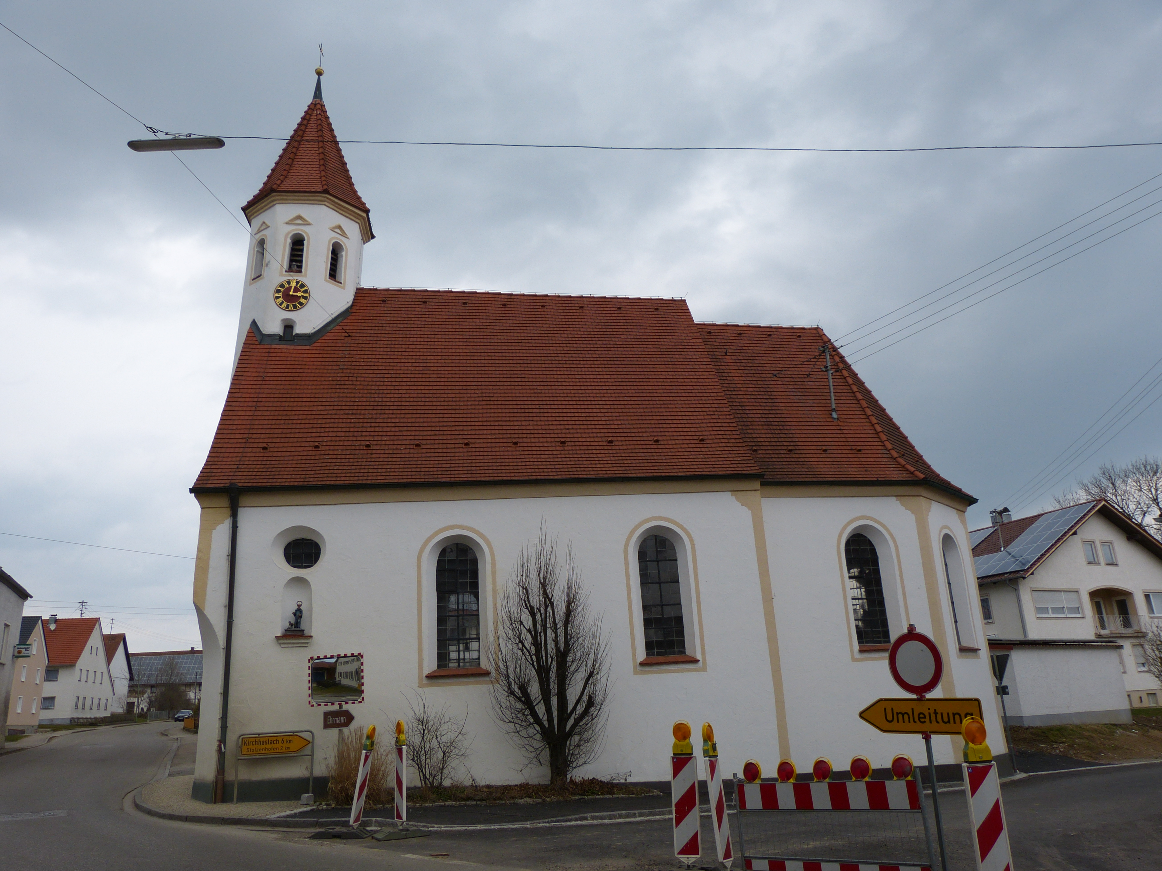 St. Leonhard, Gemeinde Oberschönegg, Landkreis Unterallgäu, Bayern